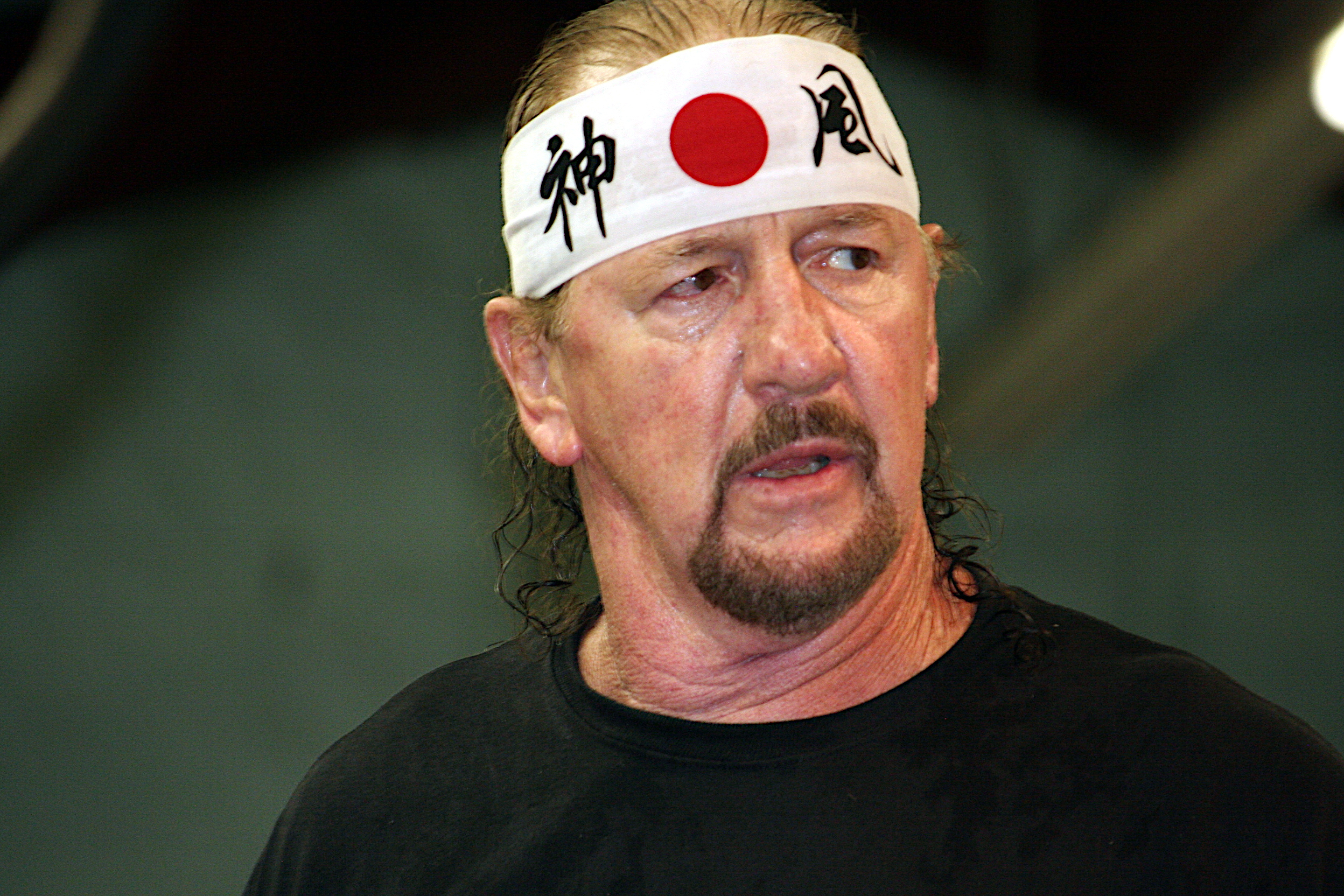 Terry Funk en septembre 2013.